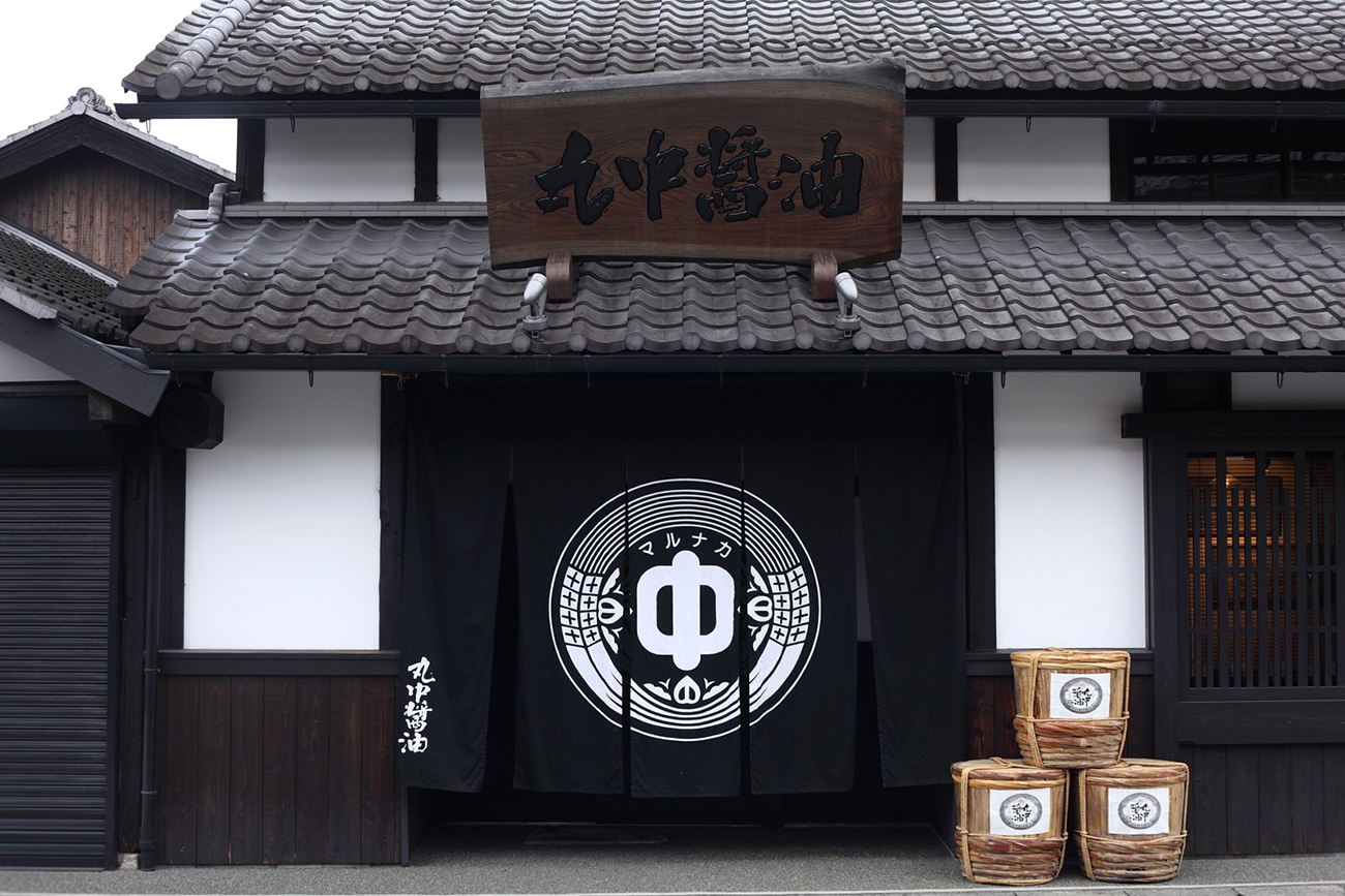 丸中醤油蔵玄関